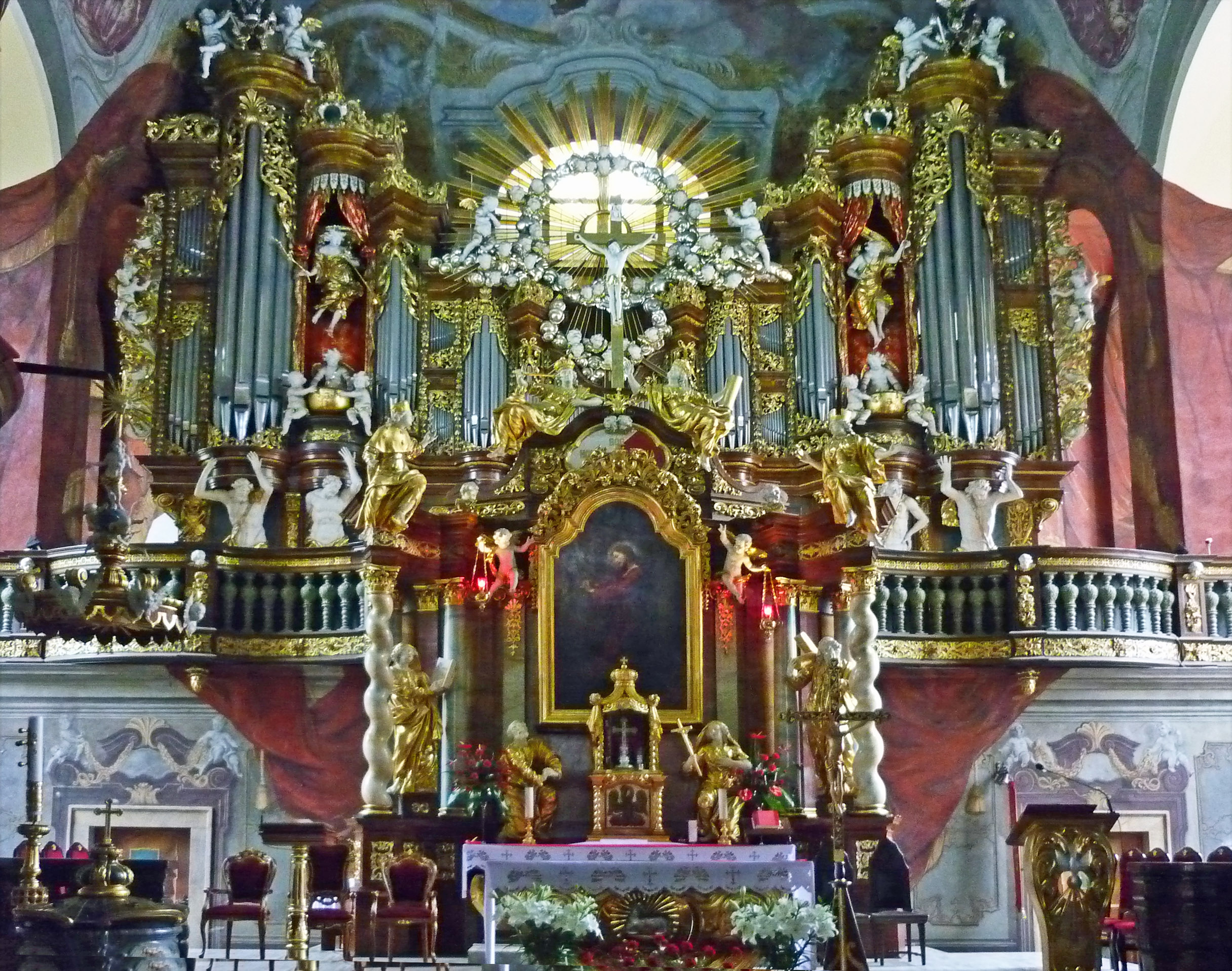 Interieur der Gnadenkirche Hirschberg (Jelenia Góra) in Niederschlesien